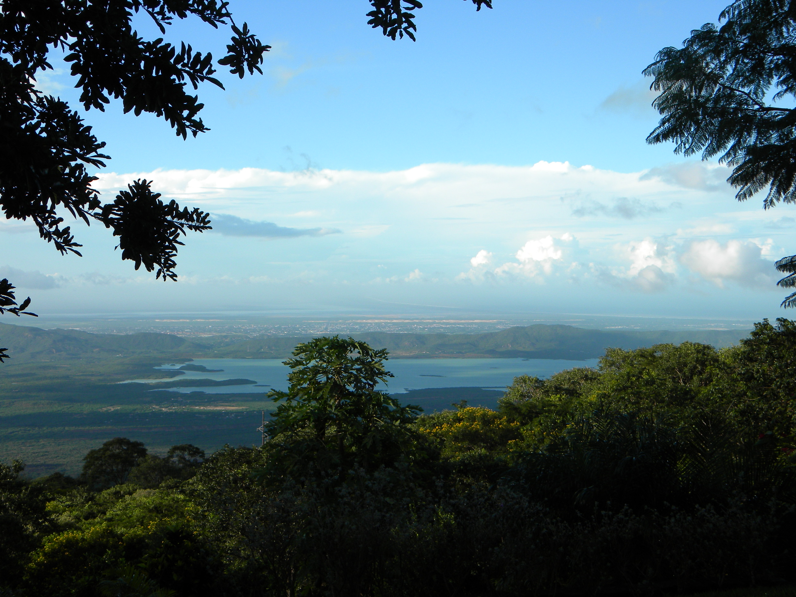 Embalse de El Isiro visto desde la Chapa. Este sector de la Sierra Falconiana posee una magnífica vista hacia dicha represa, la ciudad de Coro, los médanos y la península de Paraguaná, además de un clima fresco, venteado y de una suave y usual llovizna.